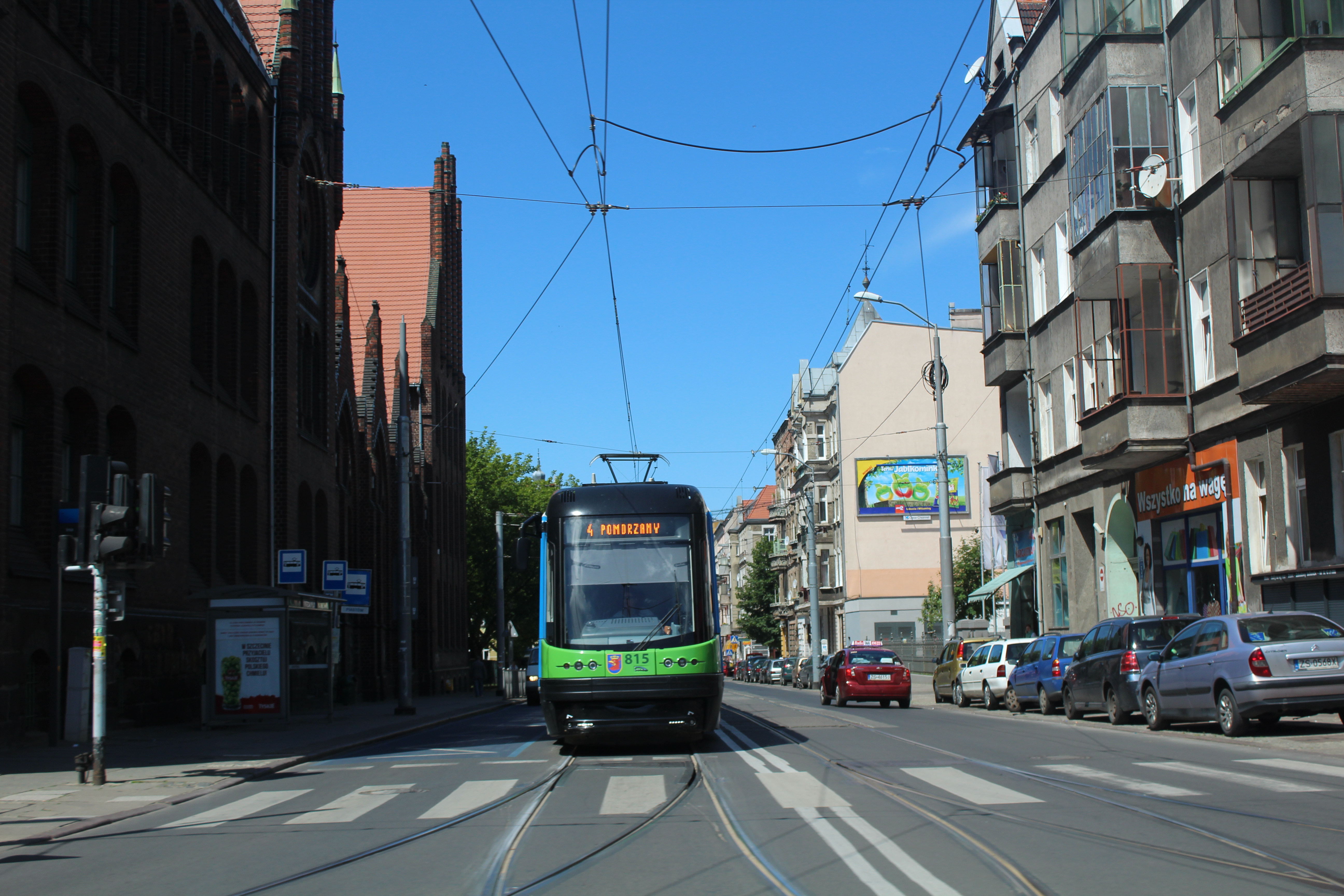 PESA 120Na w Szczecinie